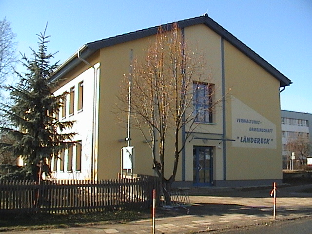 Sitz der Verwaltungsgemeinschaft Ländereck in Seelingstädt.